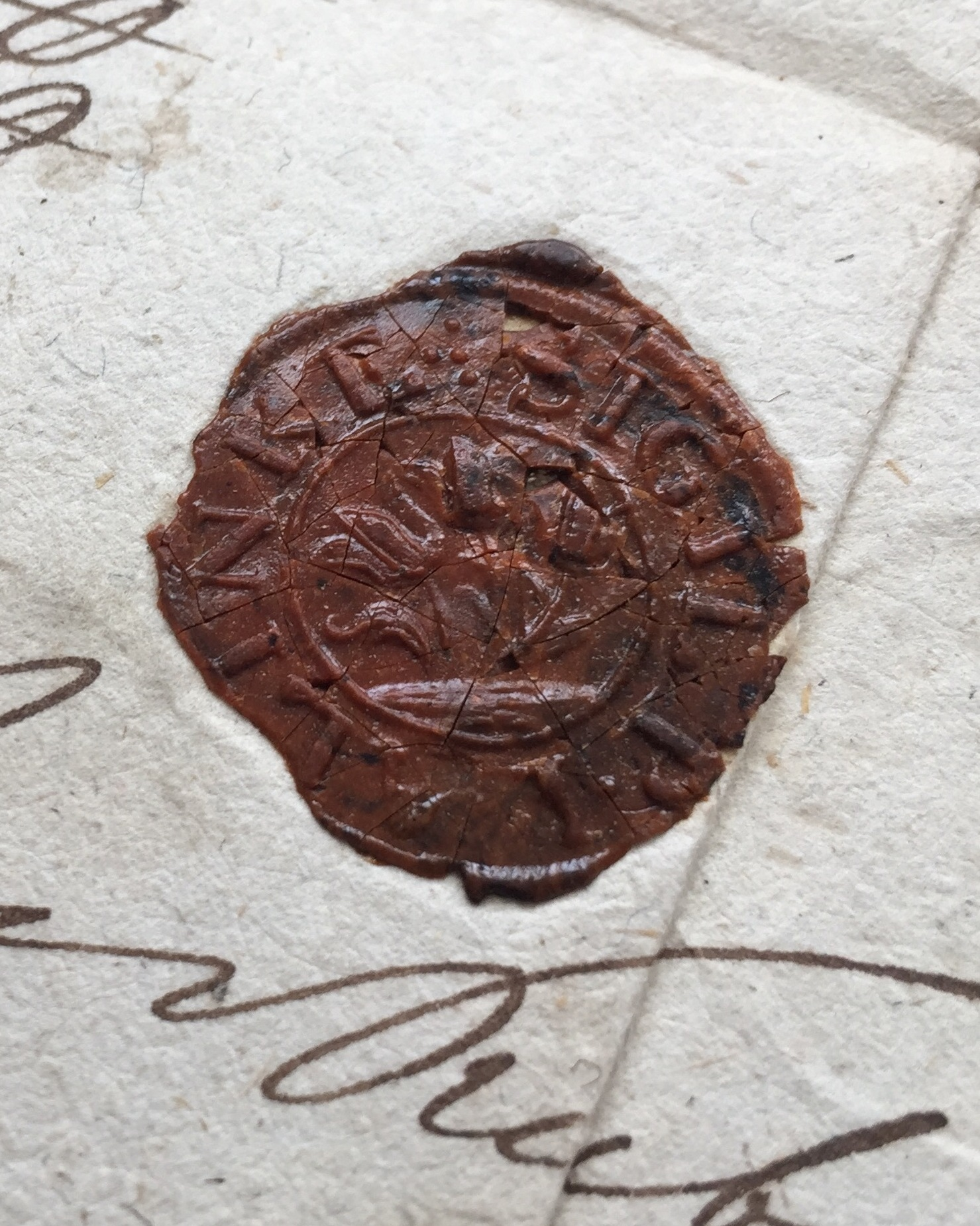 Pečať obce Lalinok, 18. storočie